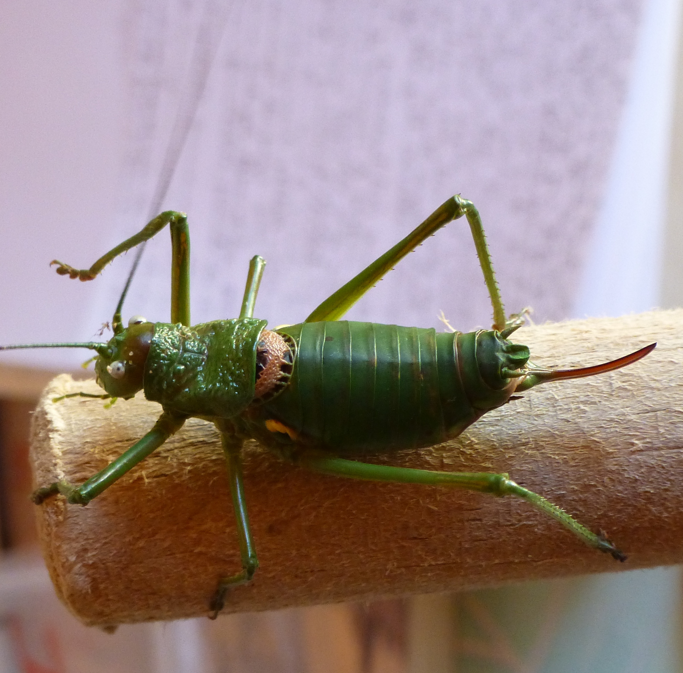 Sauterelle Uromenus rugosicollis femelle vue dorsale (île d'Oléron, France)